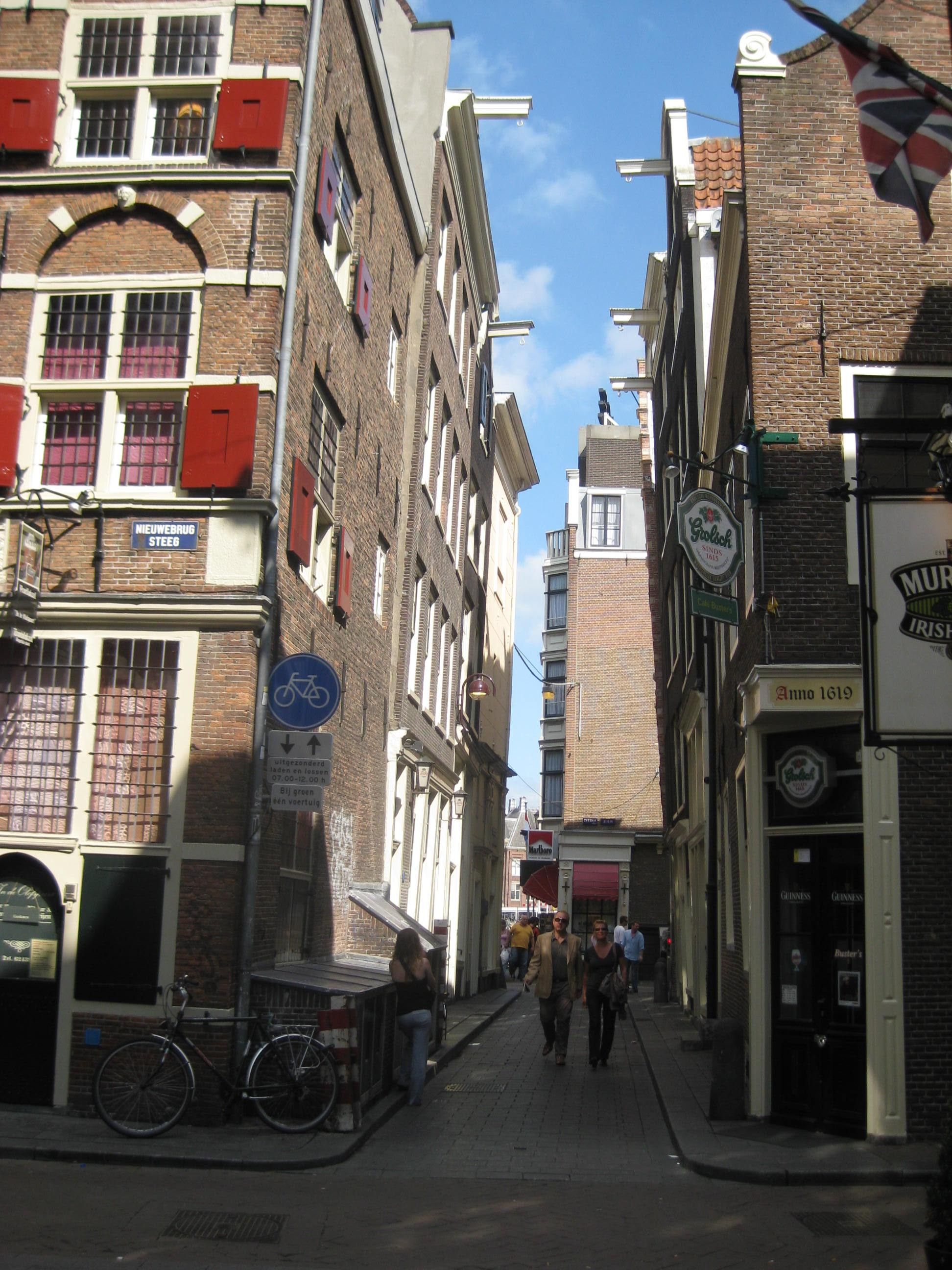 Sint Olofspoort in Amsterdam